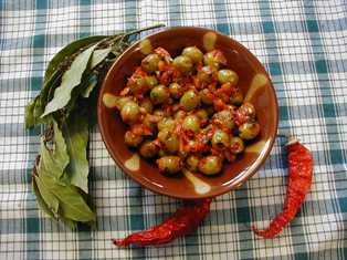 ձիթապտղով բազրկանի, Մուսալեռցի հովիվների ճաշը